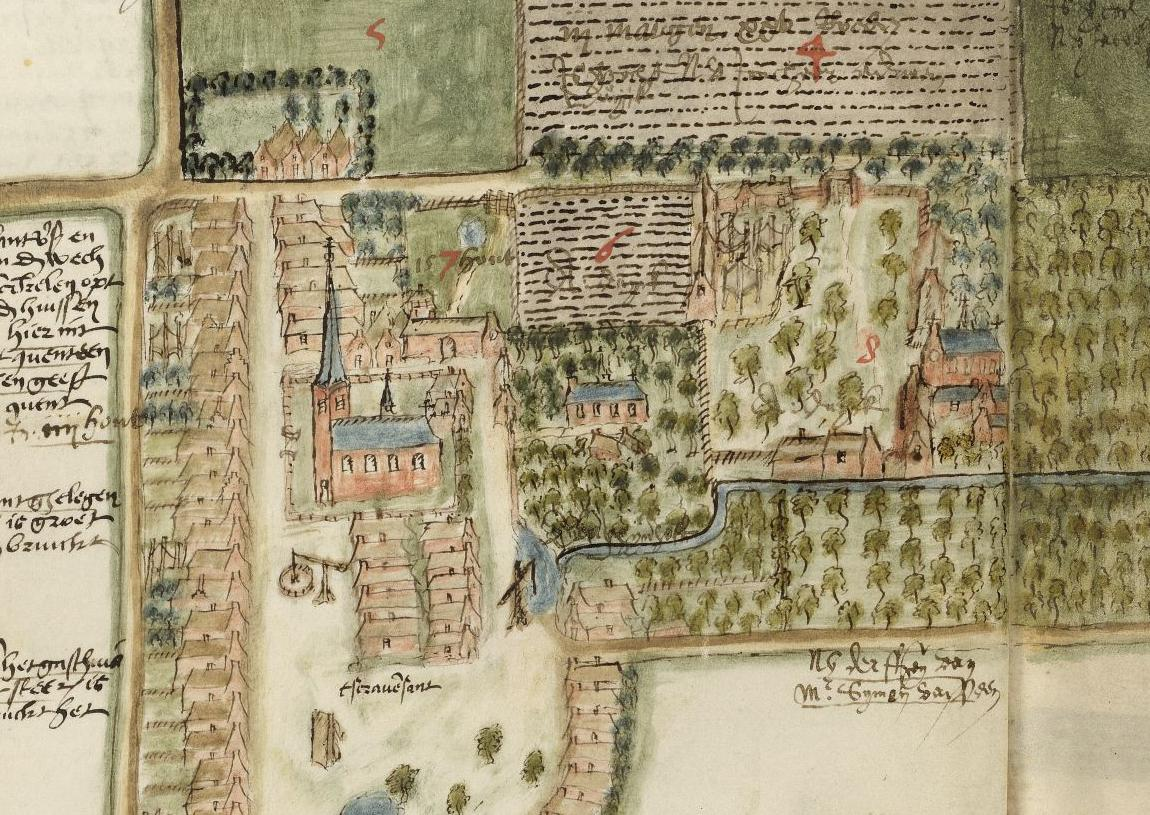 Kaartboek van de landen behoord hebbende aan het klooster der Maria Magdalena Regulieren van Bethanien te 's Gravezande, vervaardigd op last van den prior Anthonis Pieterz. van Oudenhoven door Coenraet Oelenzn. Afgebeeld is 's-Gravenzande met uiterst rechts het klooster, links daarvan het gasthuis en links daar van de Dorpskerk.